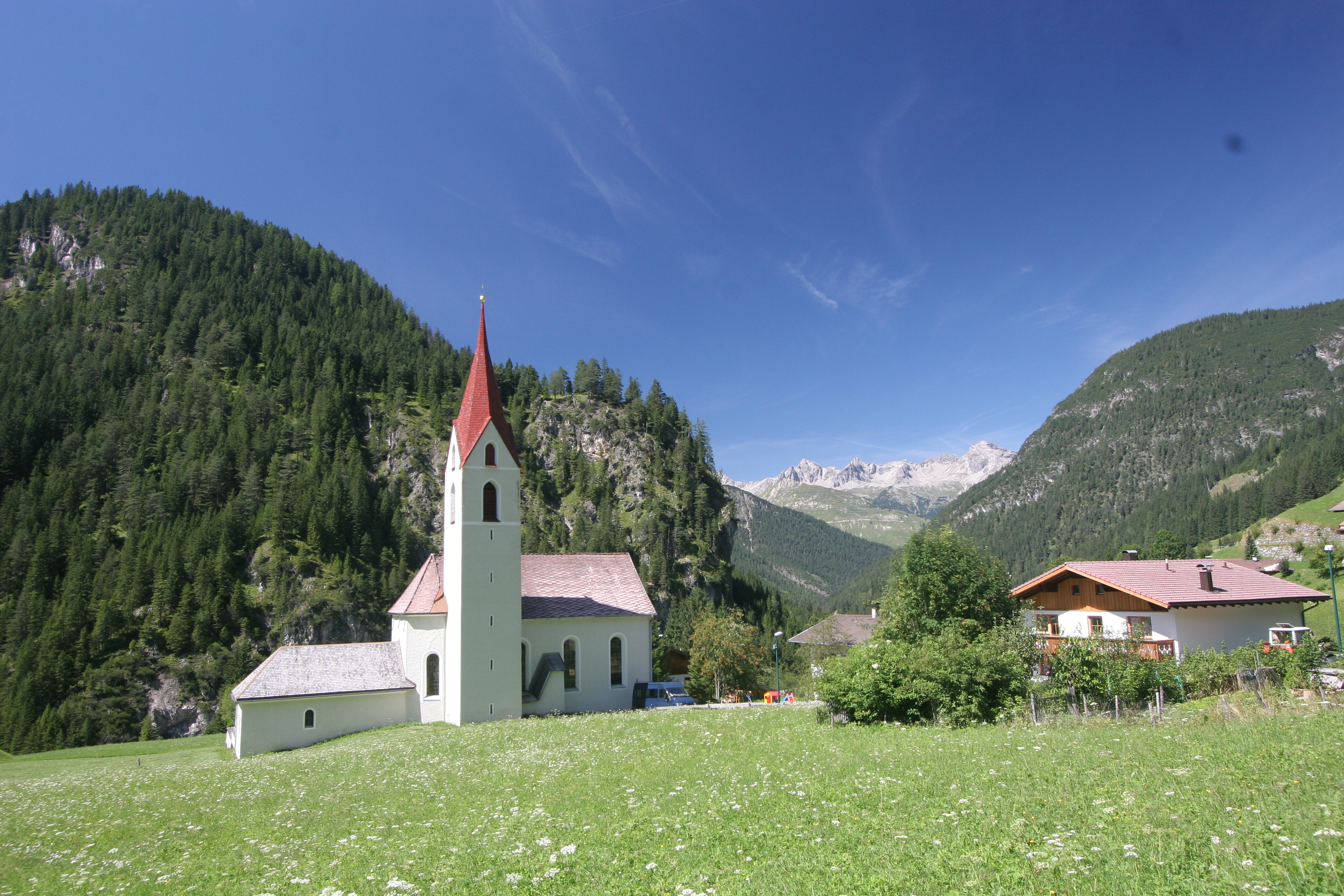 Kirche Heiliger Johannes der Täufer in Gramais. Blick zurück durch das Gramaiser Tal in Richtung Lechtal und Hornbachkette der Allgäuer Alpen mit (von links) Noppenspitze, Sattelkarspitze, Woleckleskarspitze, Gliegerkarspitze und Bretterspitze